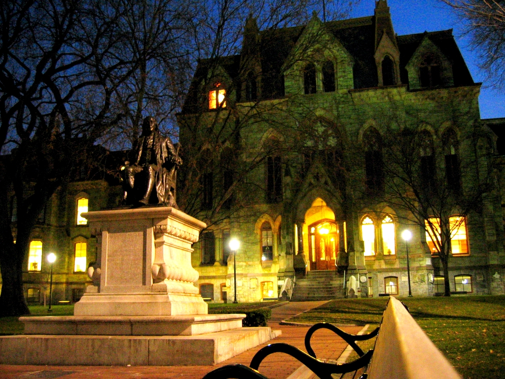 College Hall and Ben Franklin Statue